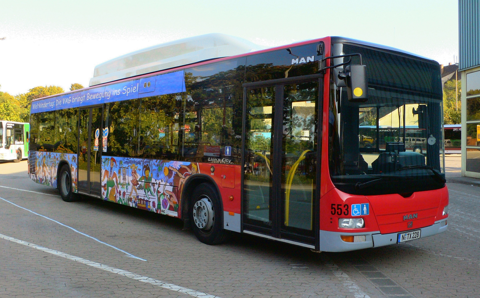 MAN NL 243 CNG LC (Wagen 553) der VAG Verkehrs-Aktiengesellschaft Nürnberg.